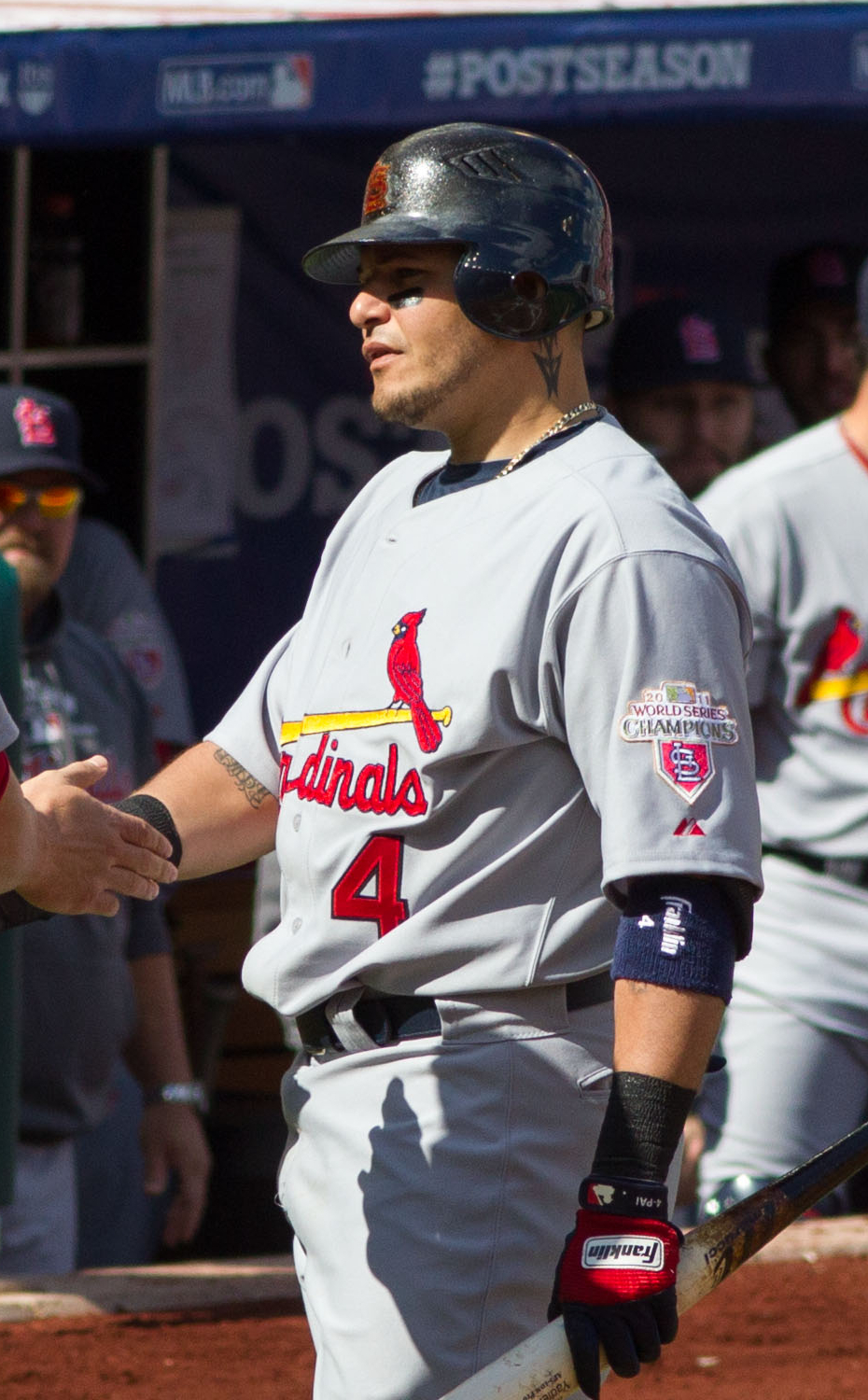 Yadier Molina